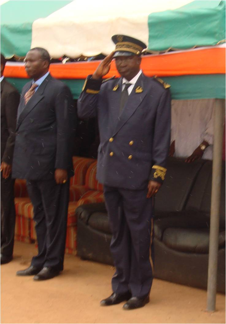 Autorité préfectorale de Côte d'Ivoire lors d'une cérémonie officielle